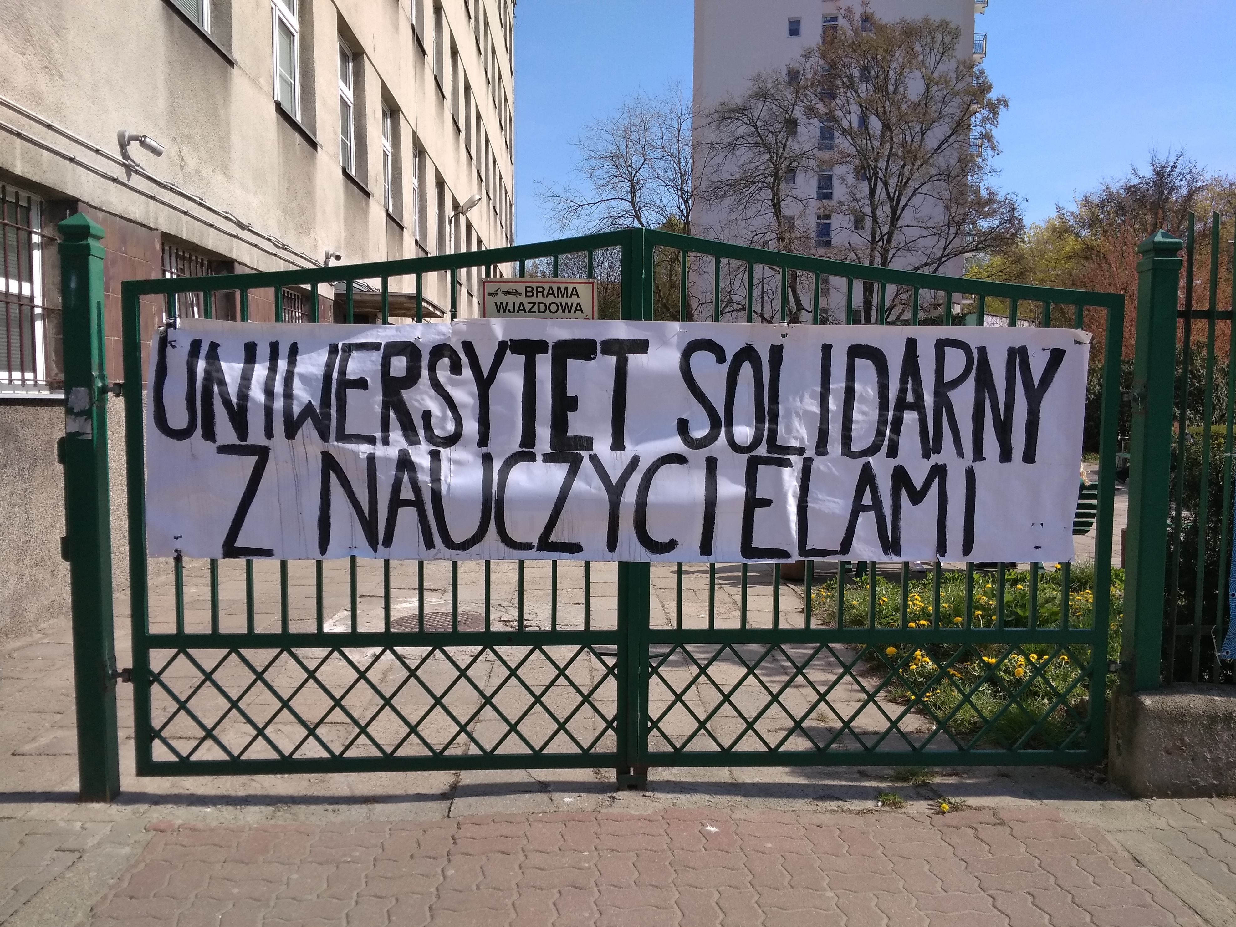 Poparcie dla strajku nauczycieli wywieszone na bramie wydziału psychologii Uniwersytetu Warszawskiego.